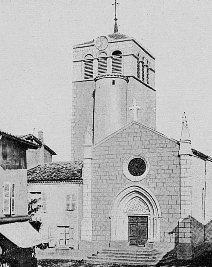 Dictionnaire illustré des communes du département du Rhône. Tome 1 / par MM. E. de Rolland et D. Clouzet.